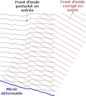 Principe de l'optique adaptative